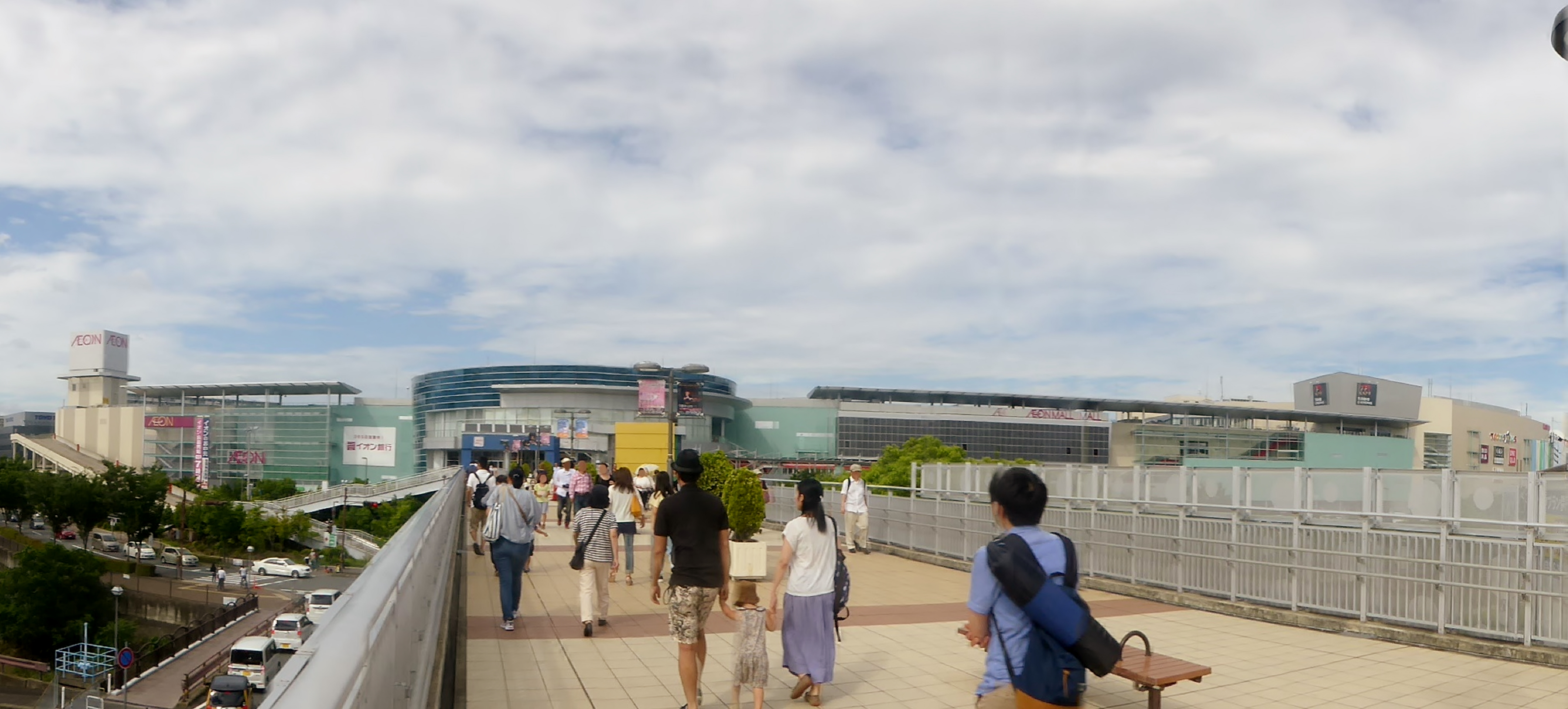 イオンモール伊丹を撮影。